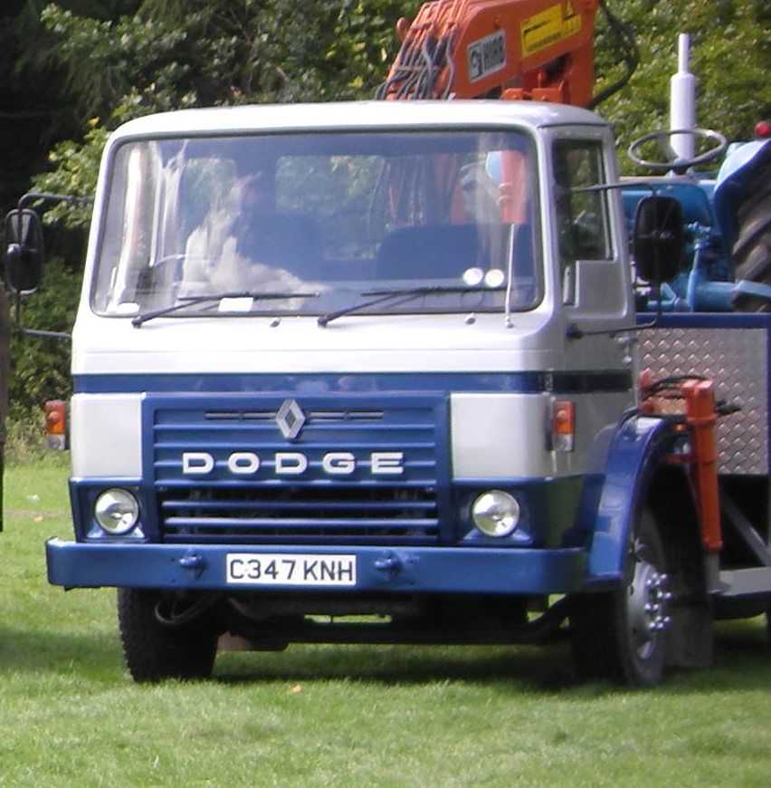 Dodge-Renault 100 series truck